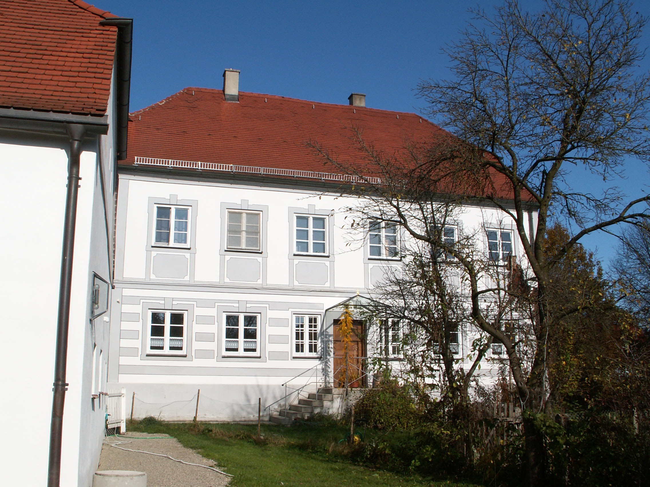 Pfarrhof Kleinkitzighofen, Lamerdingen